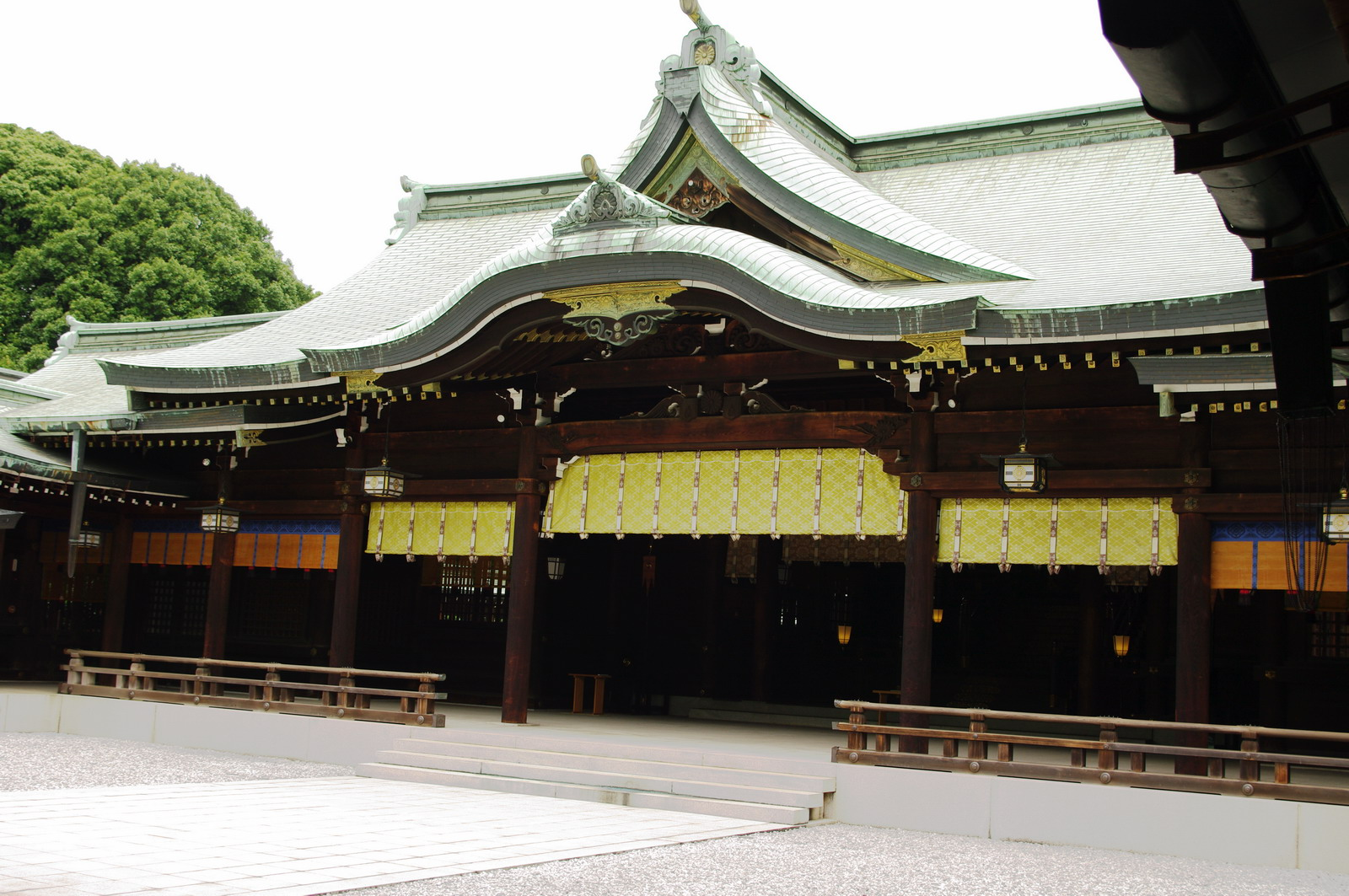 Haupthalle Meiji-jingu Schrein Tokio